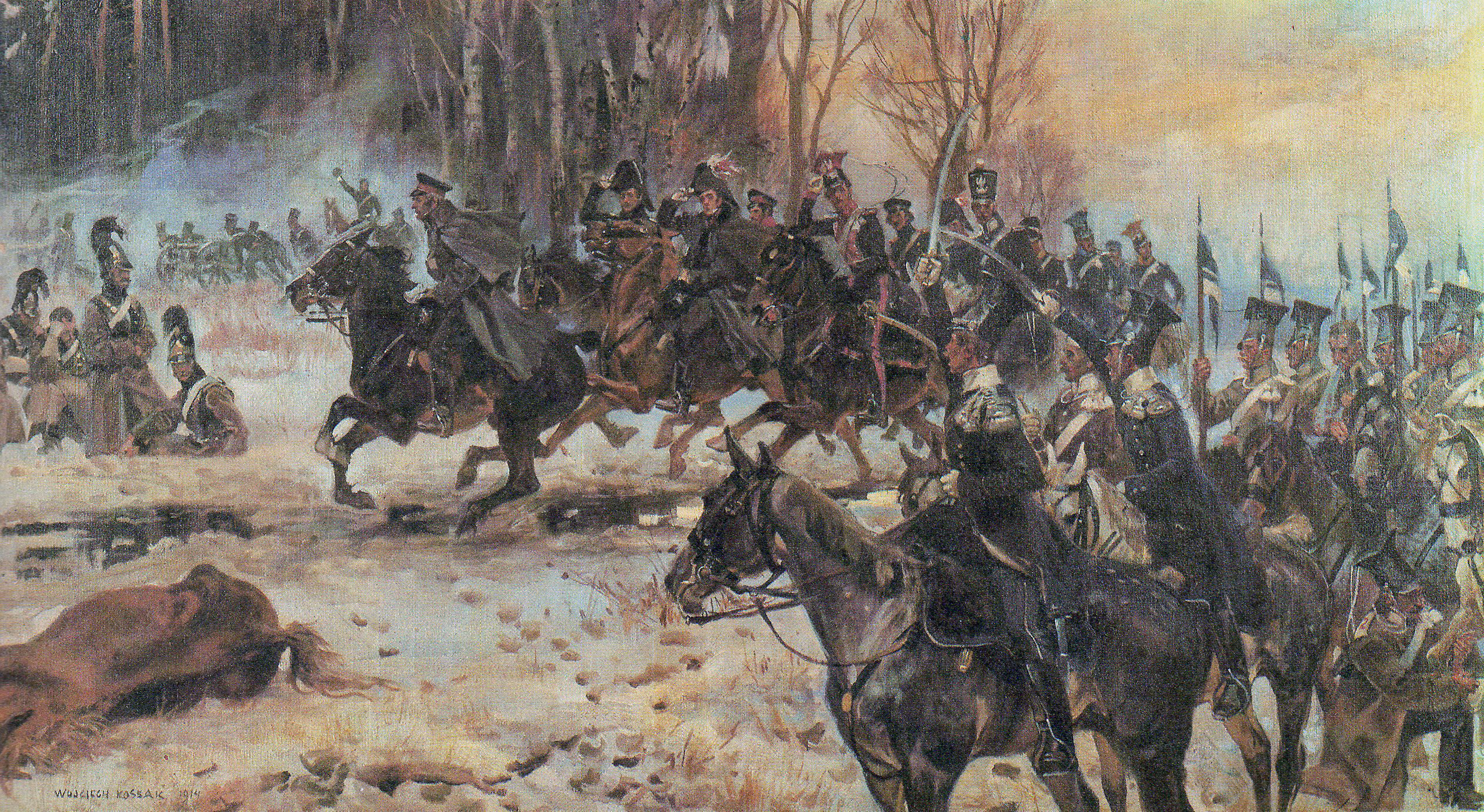 Chłopicki ze sztabem pod Olszynką